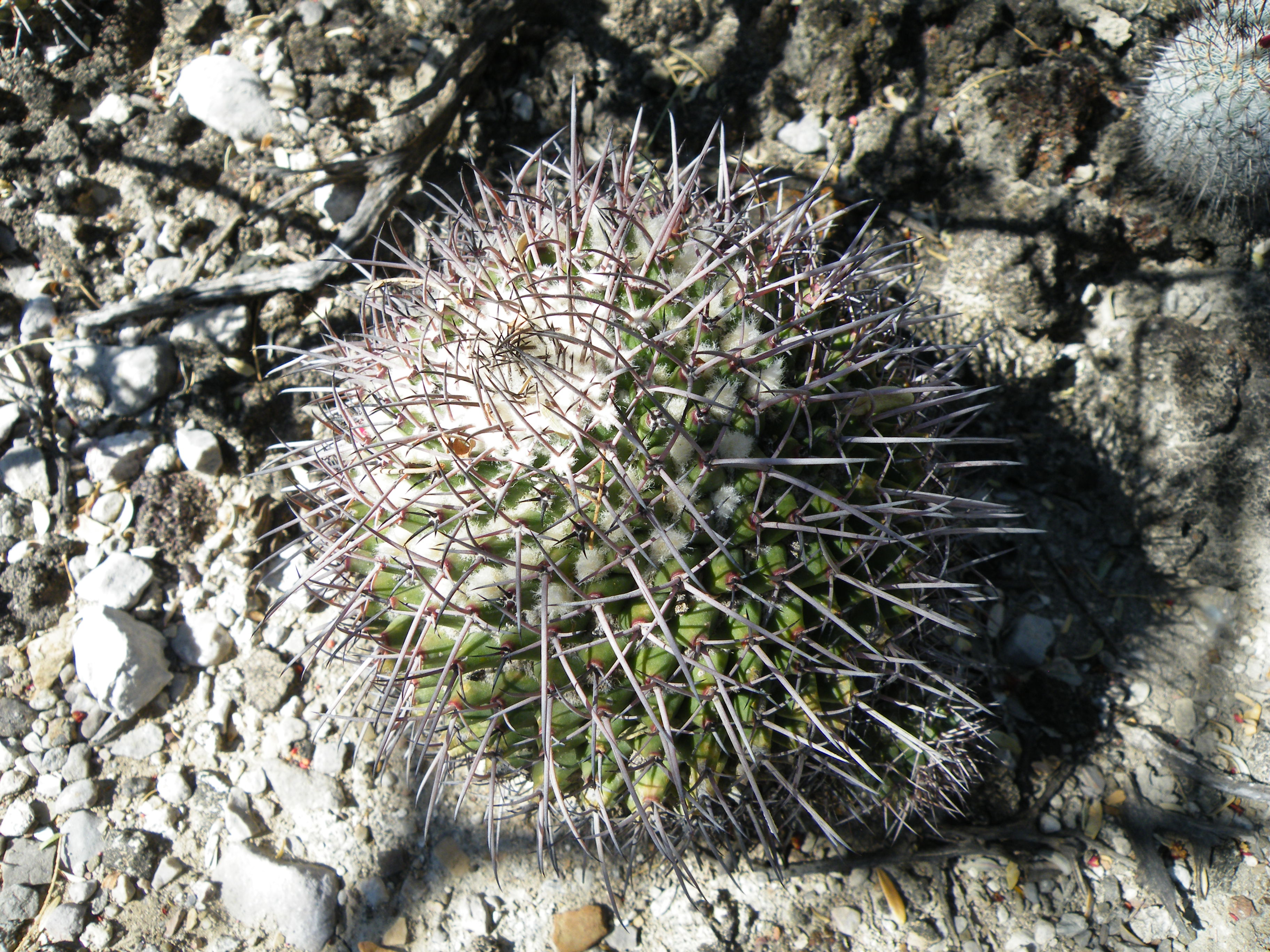 Zapotitlan De Las Salinas, Puebla